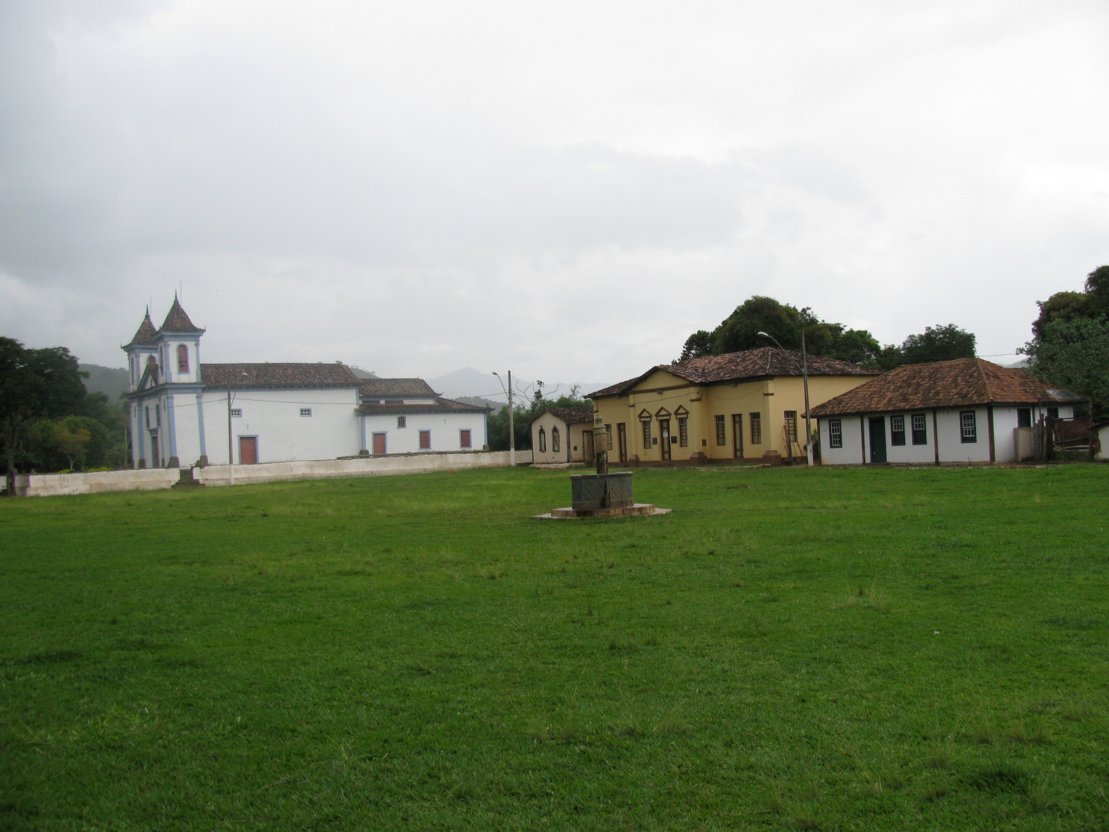 Foto de Brumal